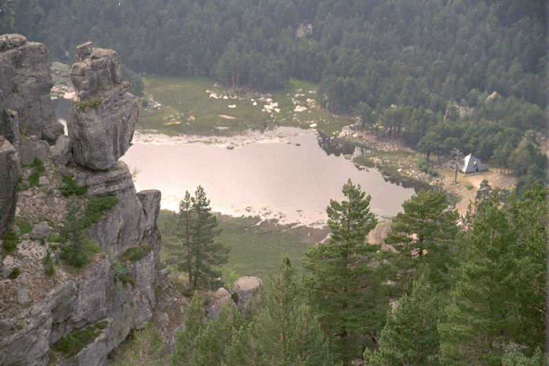 Lagunas de Neila en la provincia de Burgos (España) Tomada por --JMSE el 3 julio de 2003 y cedida a Wikipedia.